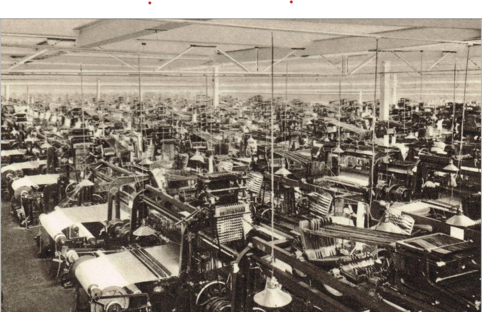 Scan Paulgerhard (22.11.2019)